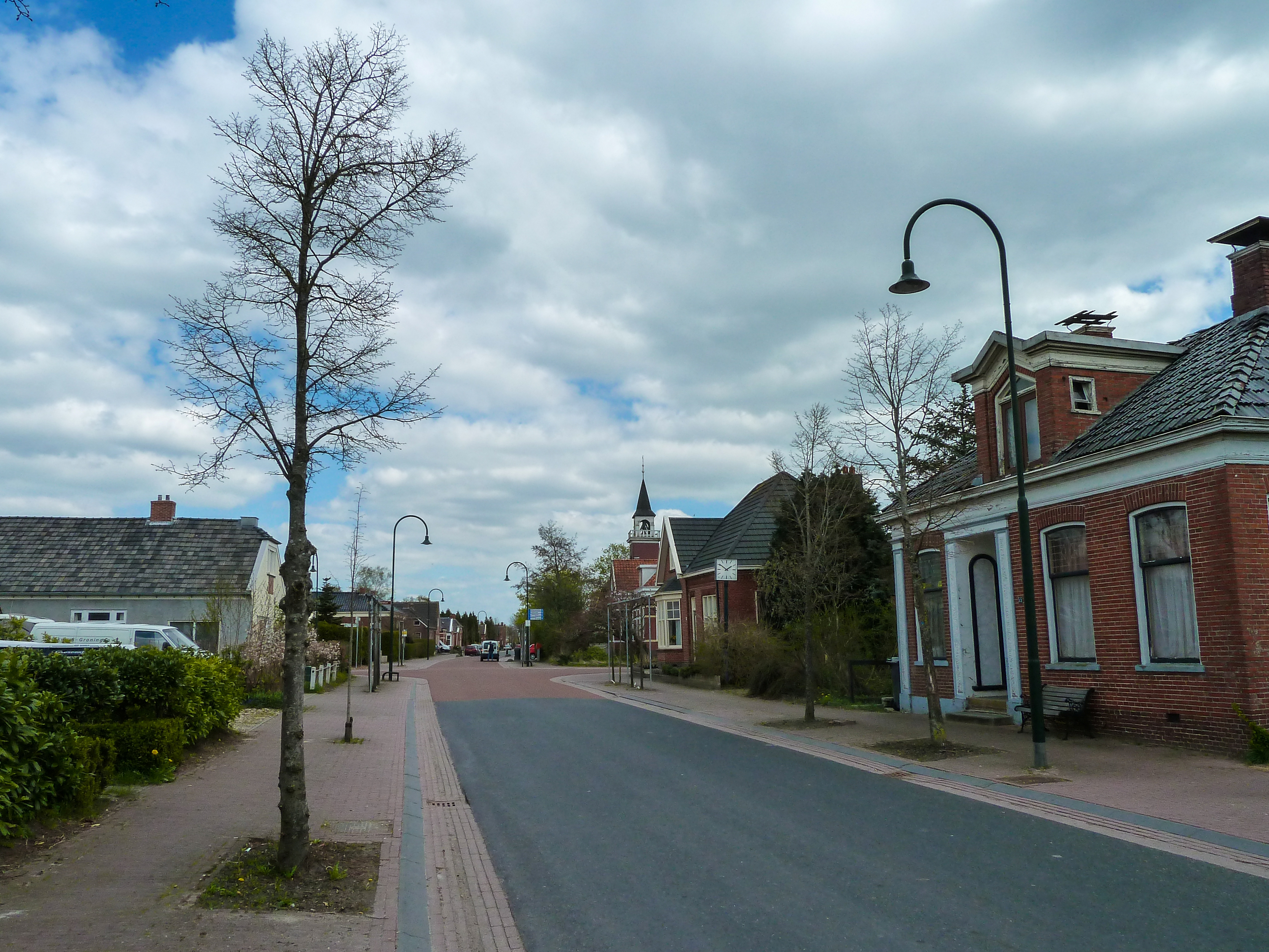 Straatbeeld Graauwedijk in Overschild